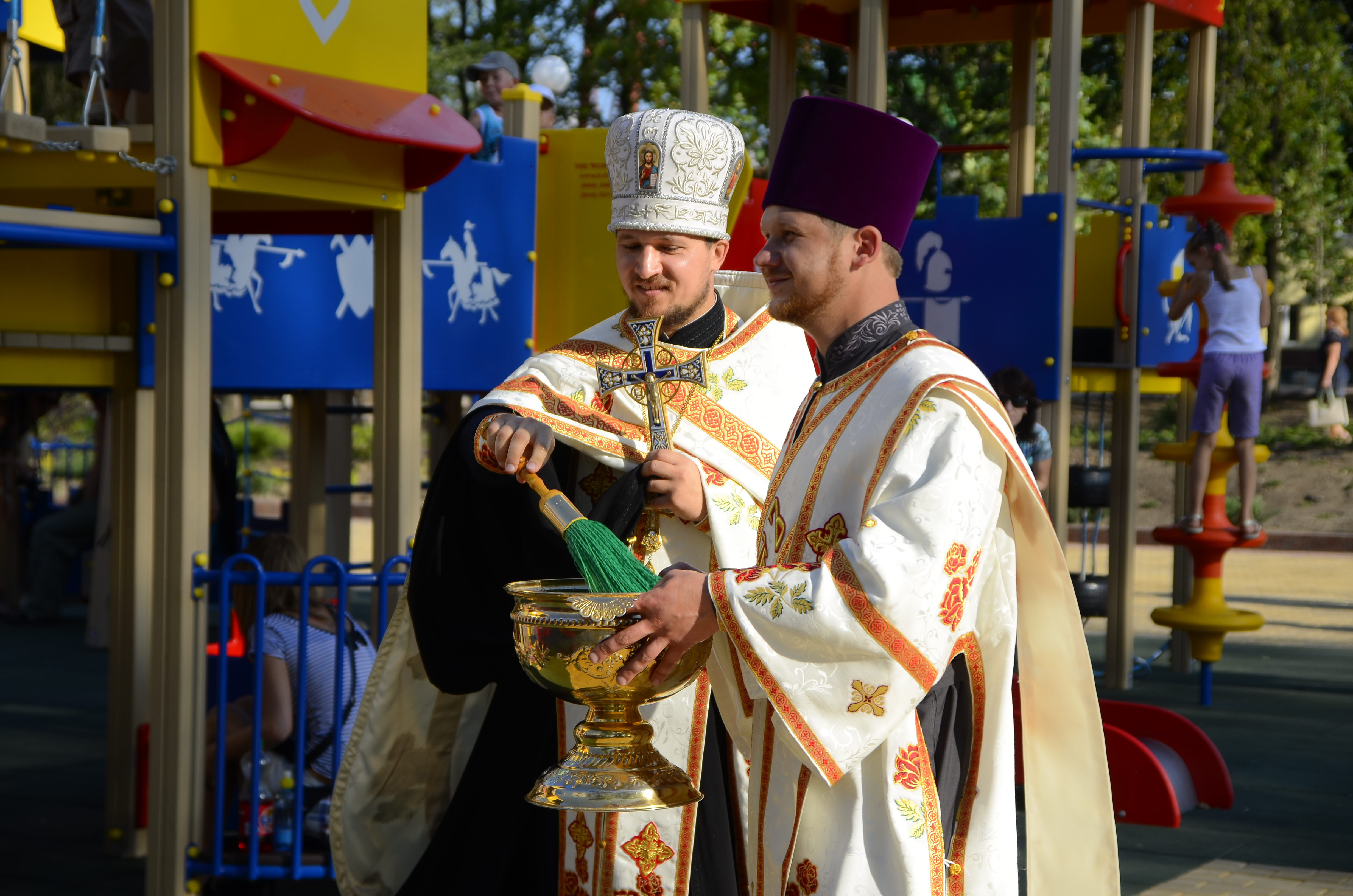 Празднование дня семьи в Донецке